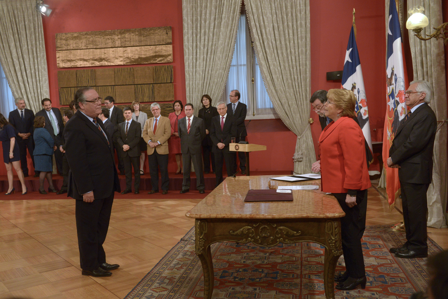 19 Octubre 2016, Ministro Marcelo Díaz participa en cambio de gabinete, luego realiza conferencia de prensa.